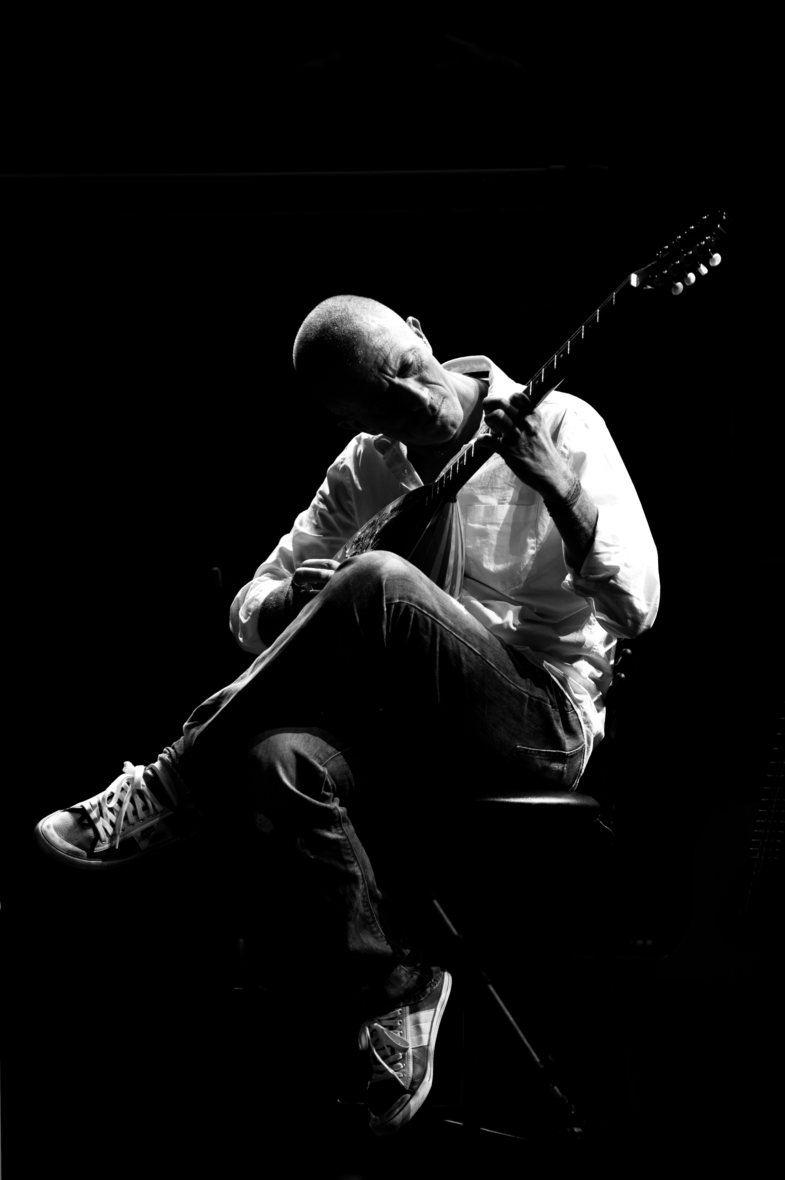 אבי סינגולדה בהופעה של שלמה ארצי בקיסריה